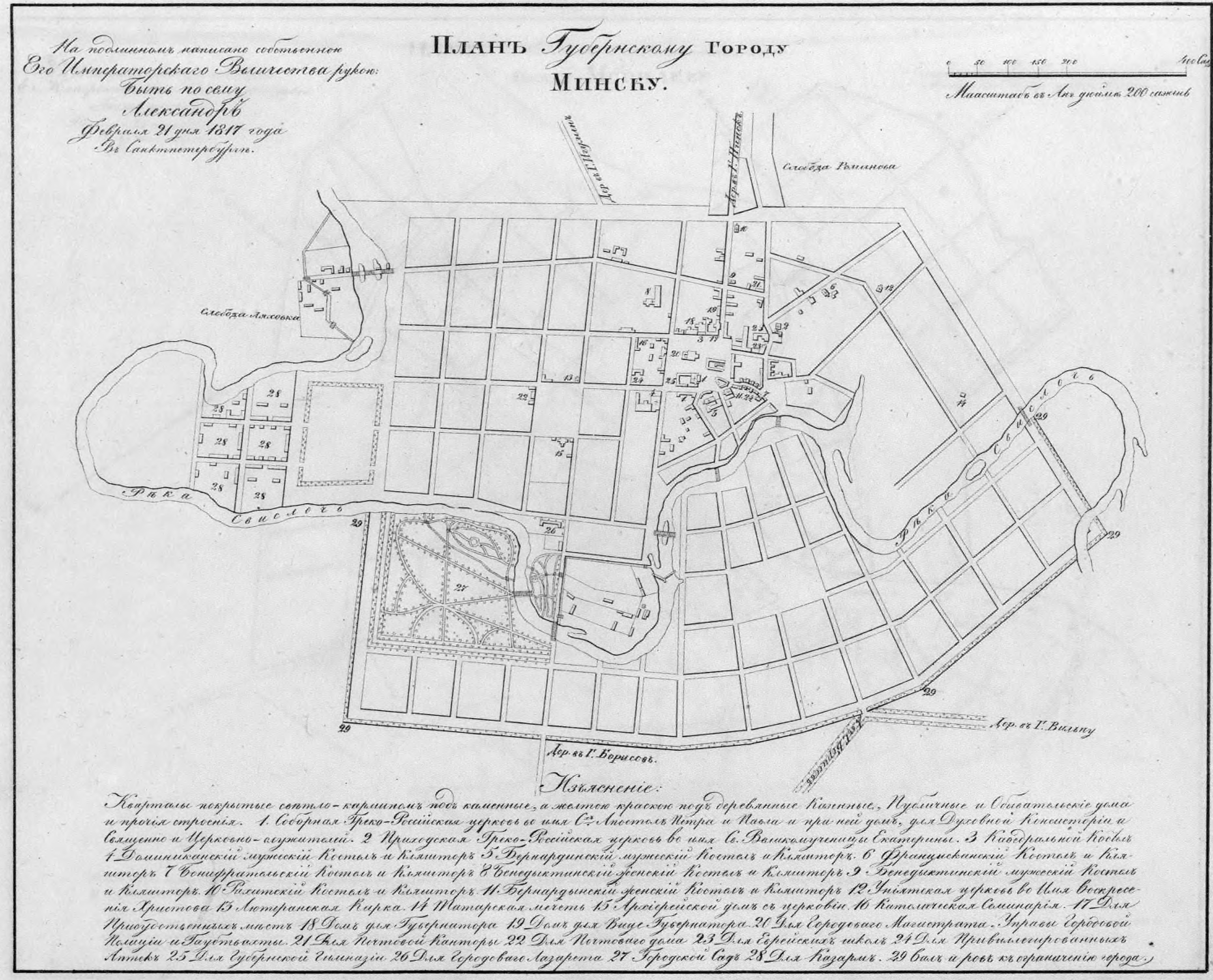 Полное Собрание Законов Российской Империи. Собрание первое. Книга чертежей и рисунков. (Планы городов).; 1839, Санктпетербургъ, Въ Типографіи II Отделенія Собственной Е. И. В. Канцеляріи.